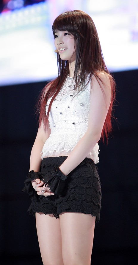 Bae Suzy at K Collection in Seoul, 11 March 2012